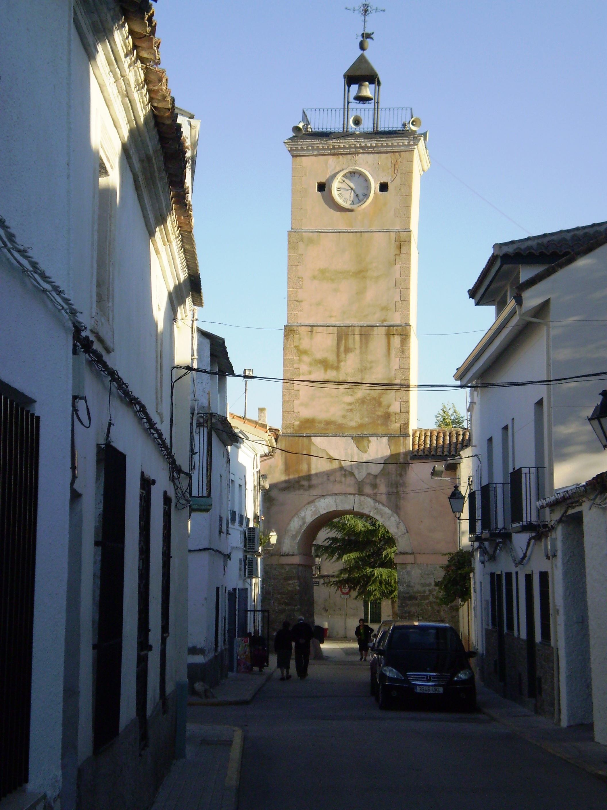 Torre del Reloj. Fuentidueña de Tajo, Community of Madrid, Spain